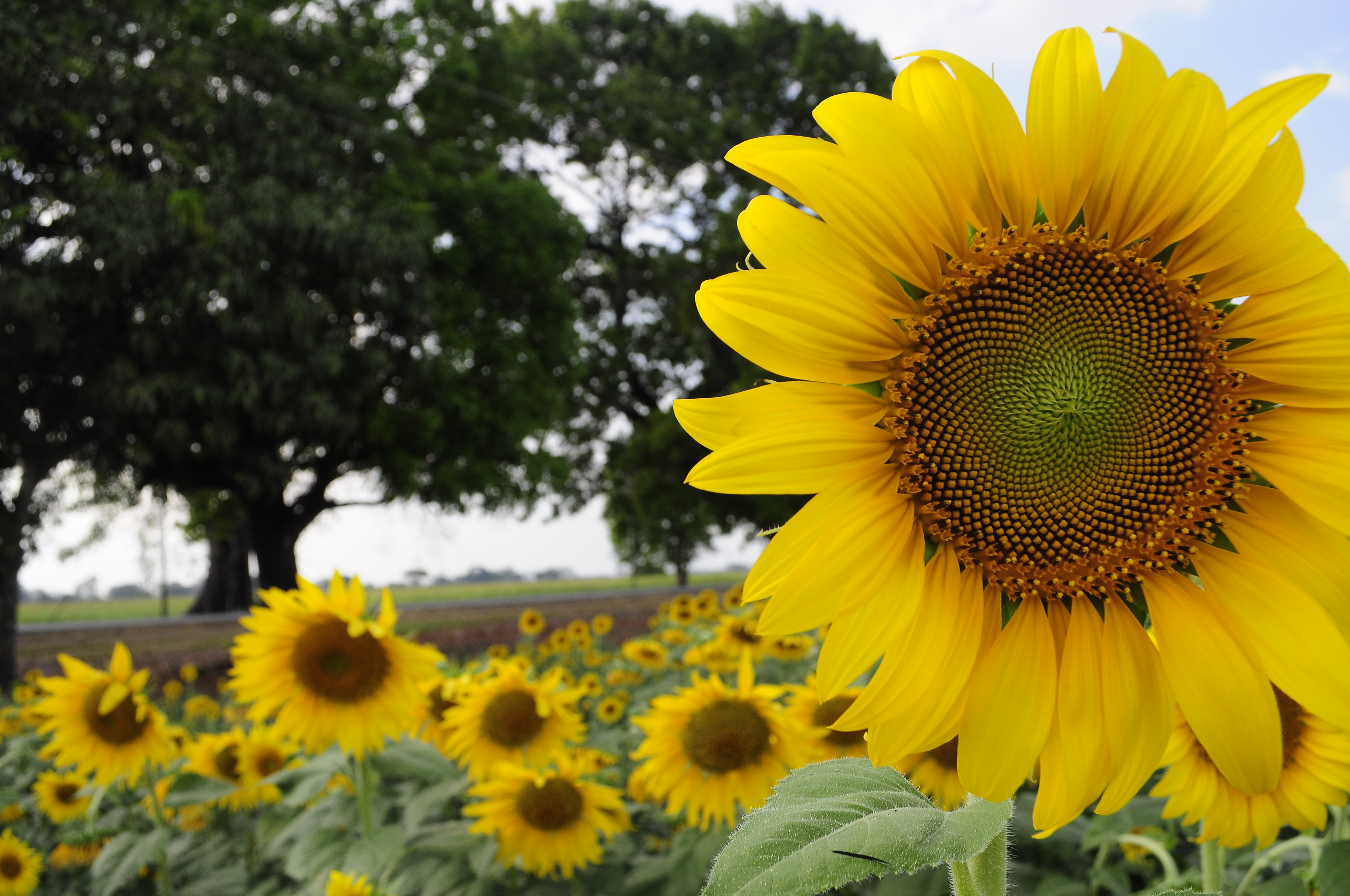 cultivo del girasol en los llanos de portuguesa